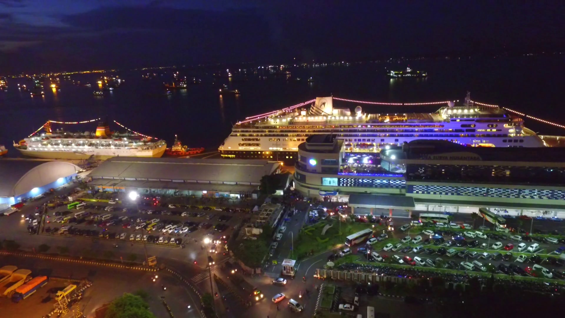 Surabaya North Quay - Tanjung Perak at Night